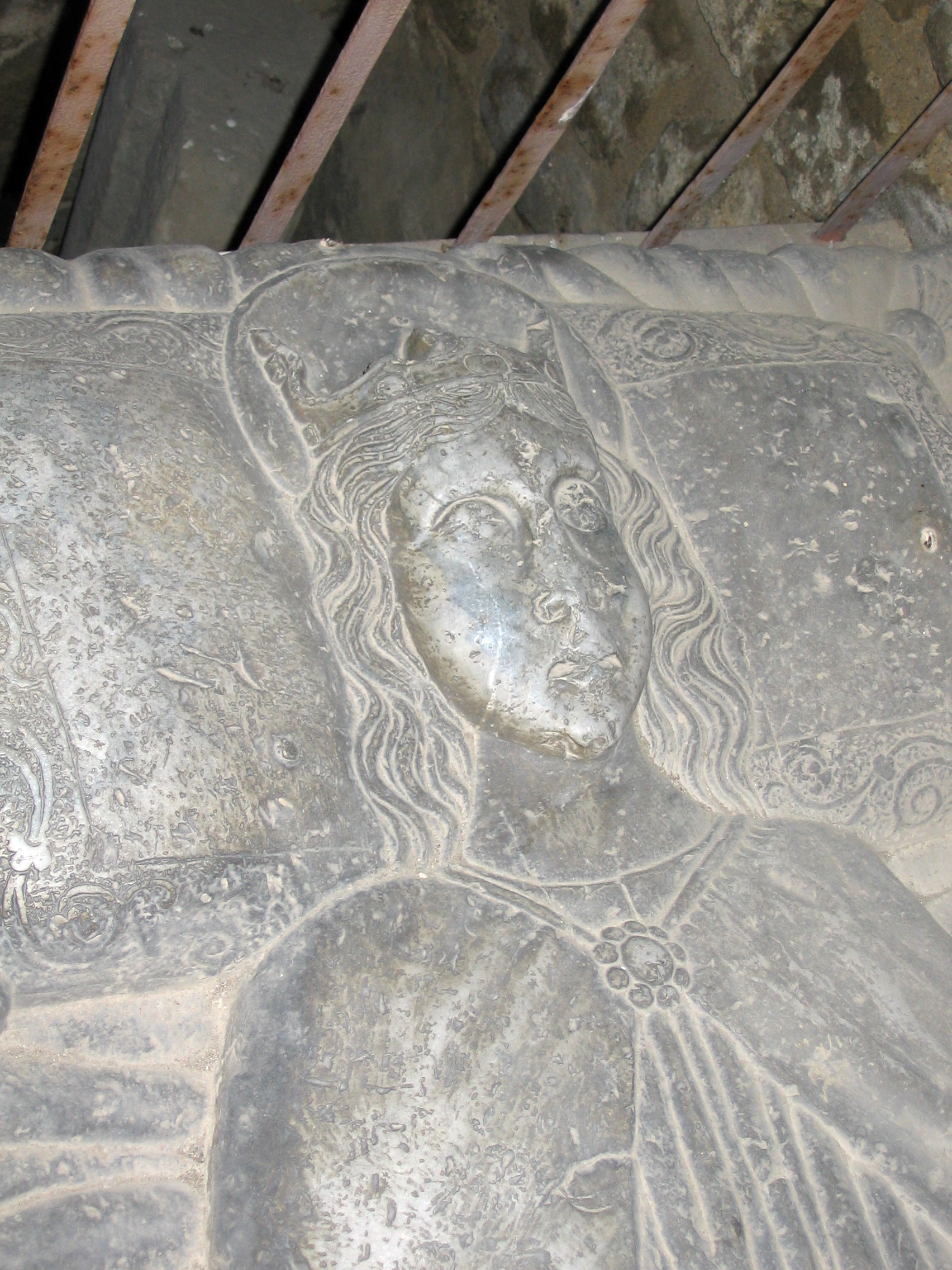 Bergamo, Abbazia di sant'Egidio a Sotto il Monte: sarcofago della regina Teiperga (1472) Autor Giorces. Particolare.